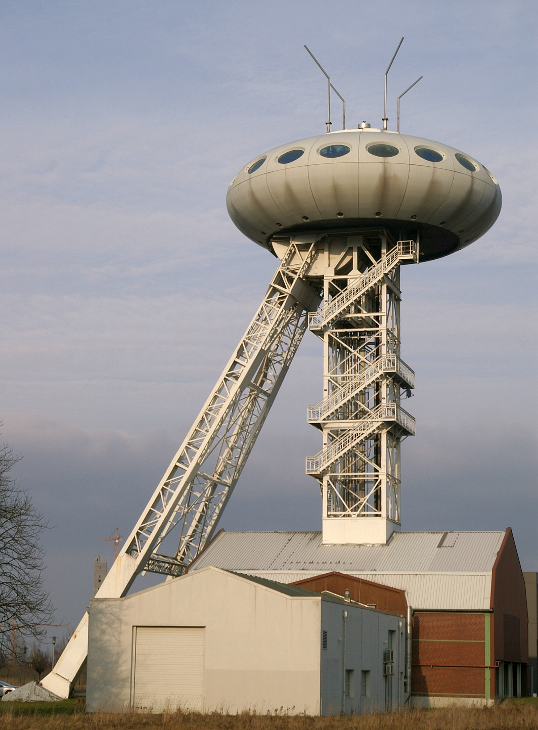 LÜNTEC, das Colani-Ei auf dem Schachtgerüst der ehem. Zeche Minister Achenbach, Lünen, Nordrhein-Westfalen